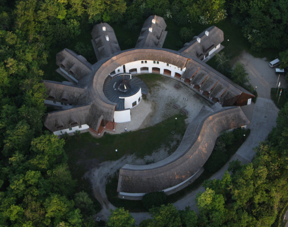 Kócsagvár, a Fertő-Hanság Nemzeti Park központja Sarródon (Győr-Moson-Sopron megye)